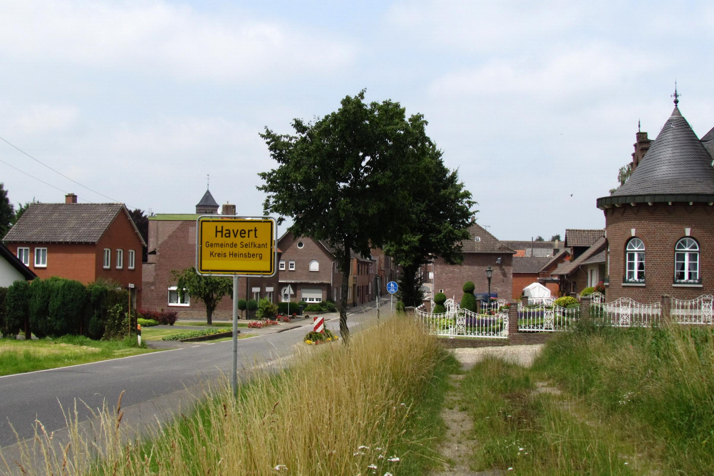 Havert Ortsschild